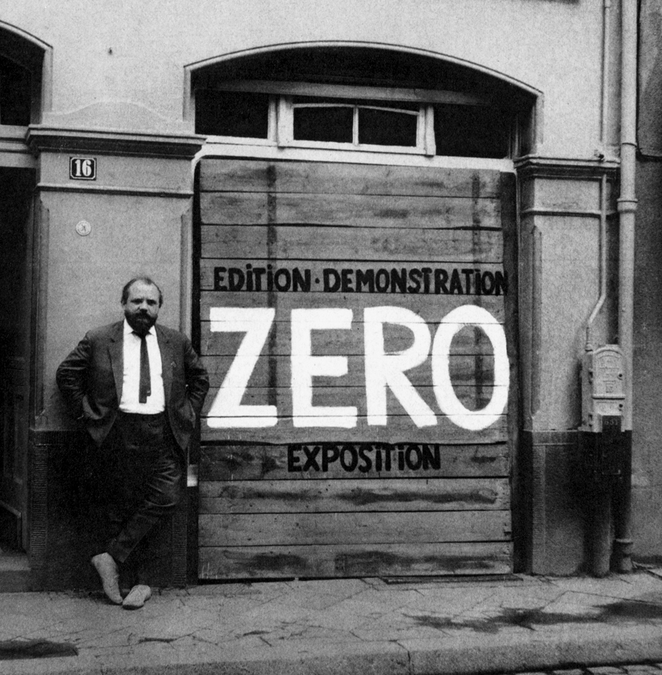 Galerist Alfred Schmela vor seiner Galerie Hunsrückenstraße 16 in Düsseldorf, 1961